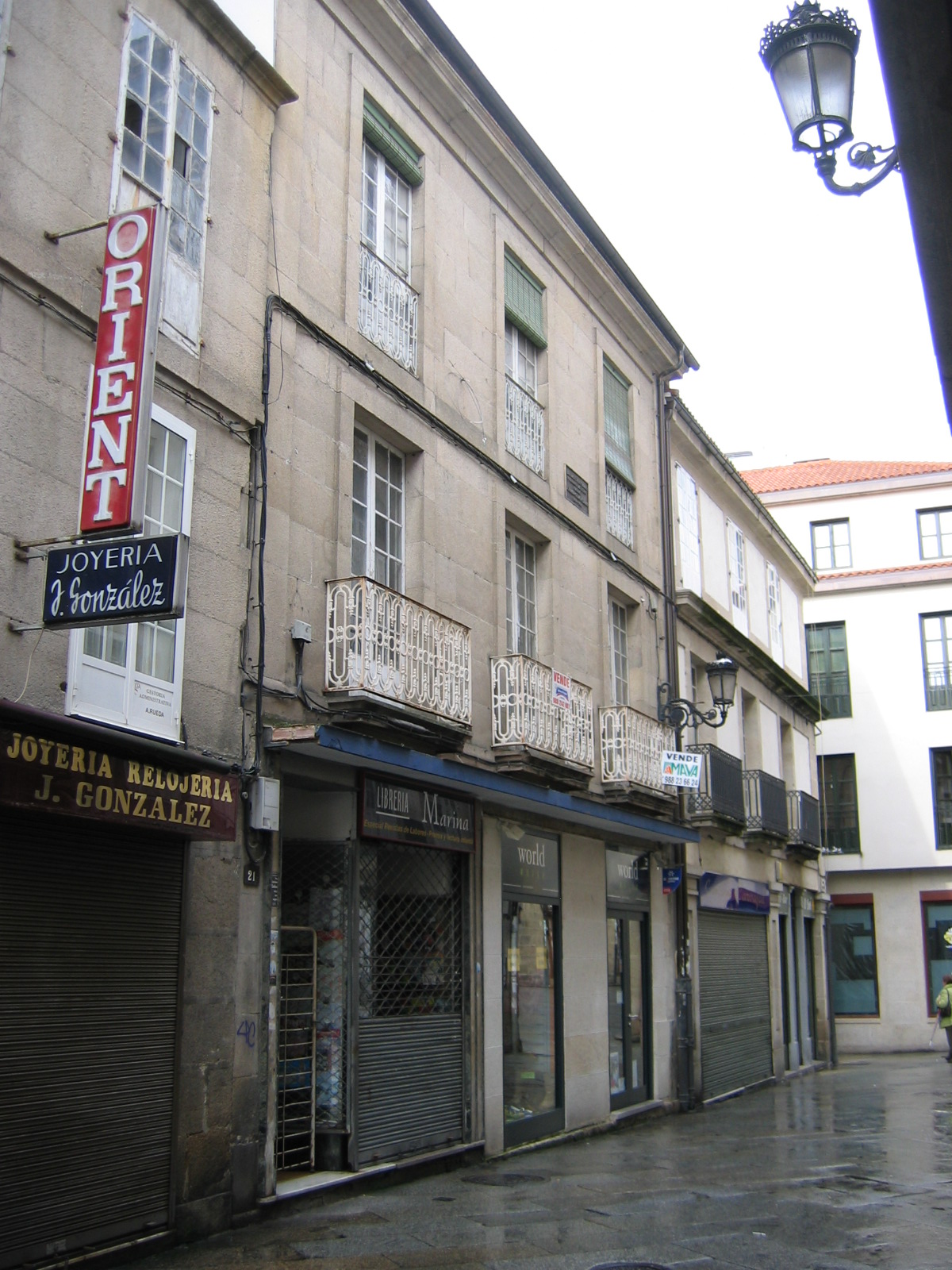 Casa natal de Vicente Risco (1º andar) e Otero Pedrayo (2º andar) (rúa da Paz, Ourense)